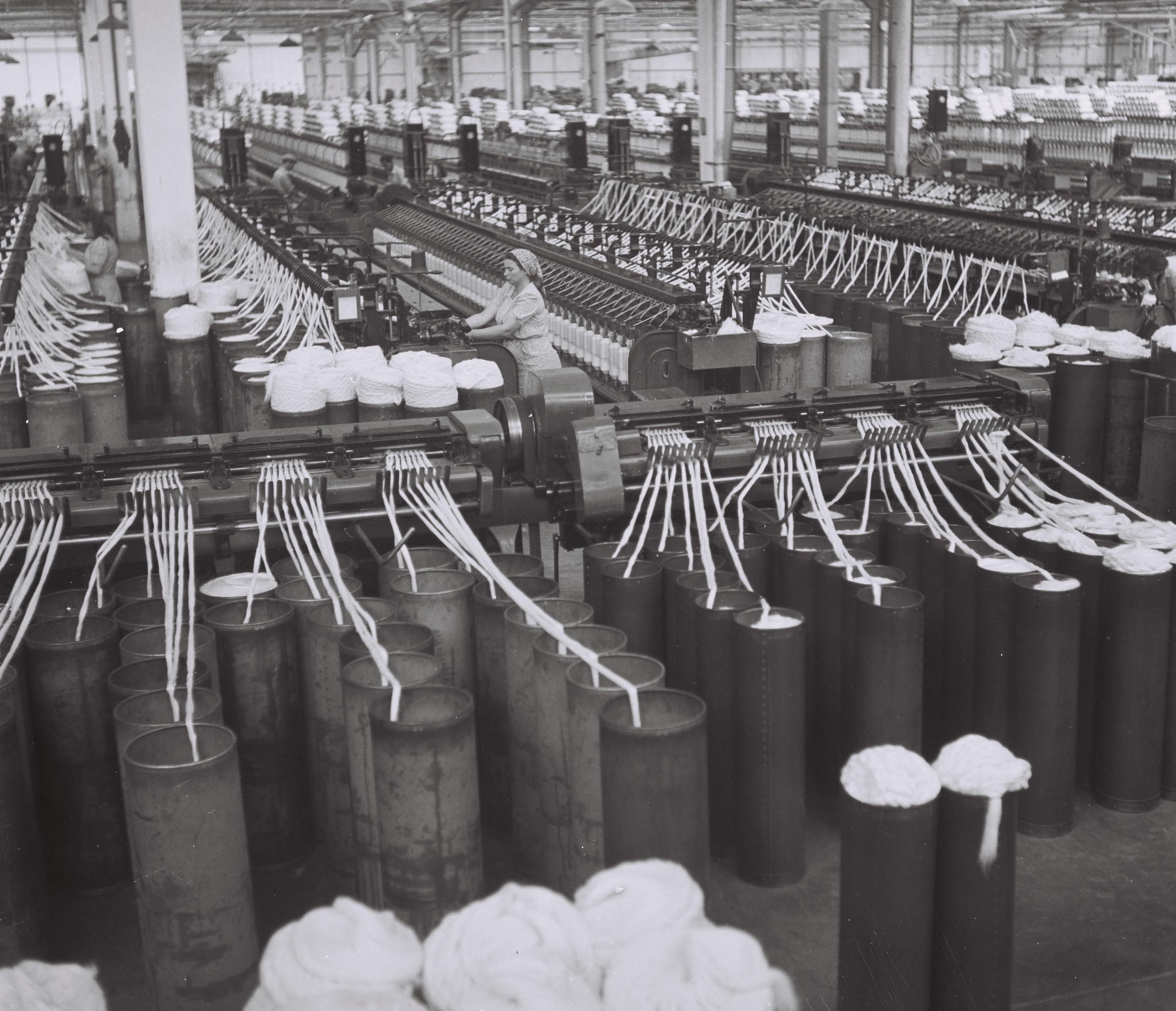 מפעל אתא.